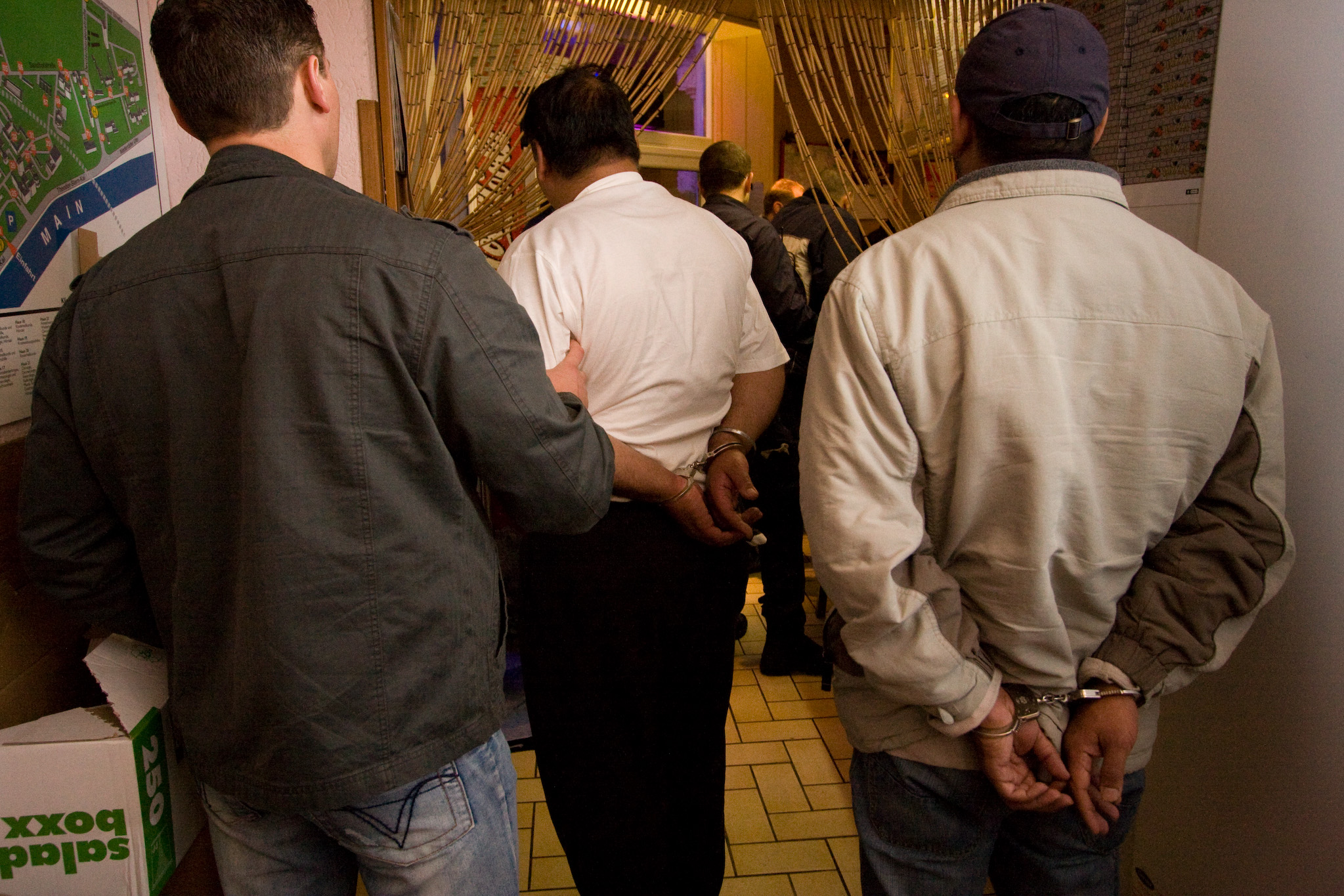 Deutsche Zivilstreife nimmt zwei mutmaßliche Schwarzarbeiter fest